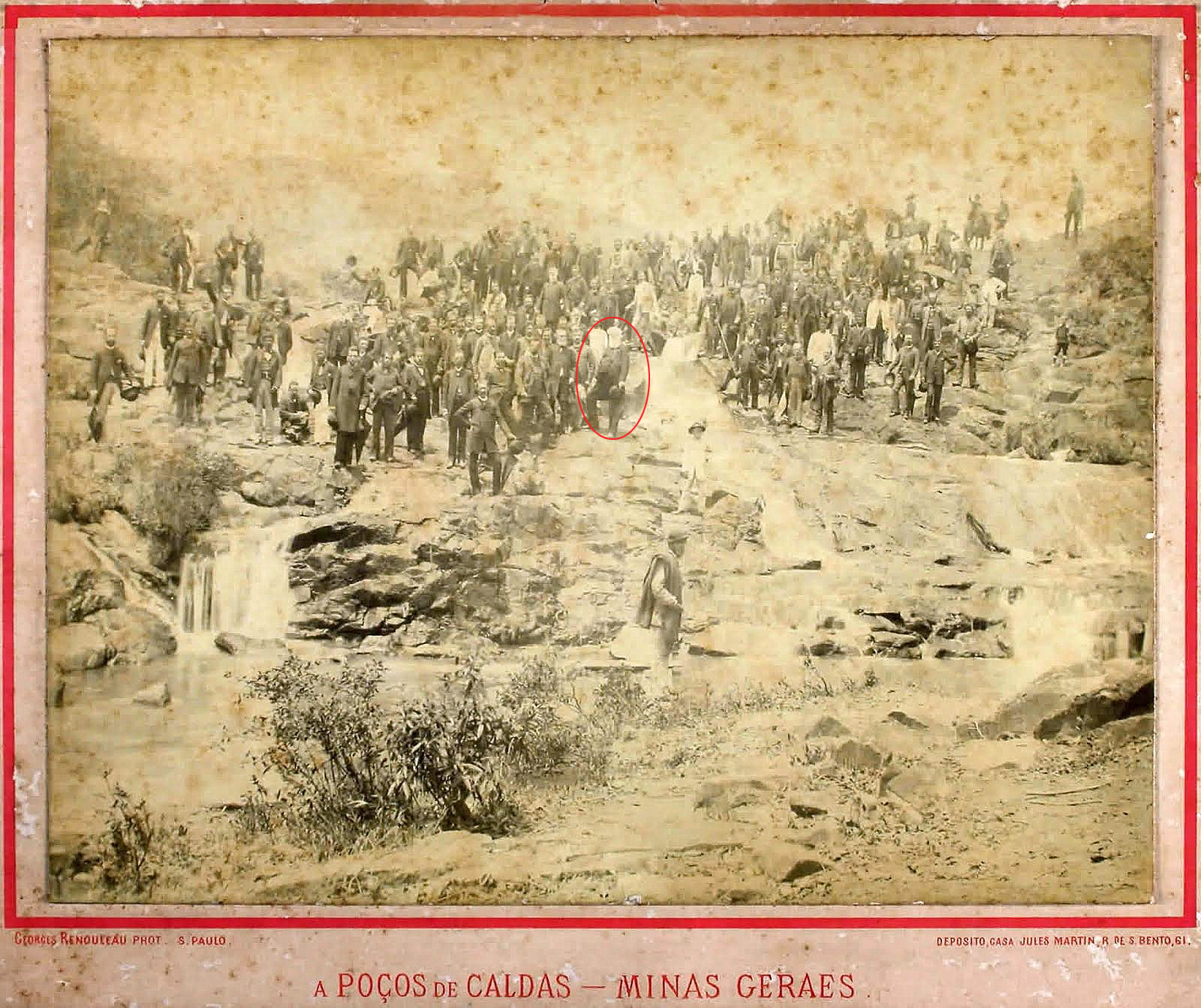 Após a inauguração da Estação Mogyana em Poços de Caldas em 22 de outubro de 1886, após visitar alguns pontos da cidade no dia seguinte, dirigiu-se o imperador D. Pedro II, acompanhado de muitas pessoas, para o aprazível local, a Cascatinha, onde um artista tirou a triunfante fotografia do numeroso grupo, em que o imperador se encontra ao centro.